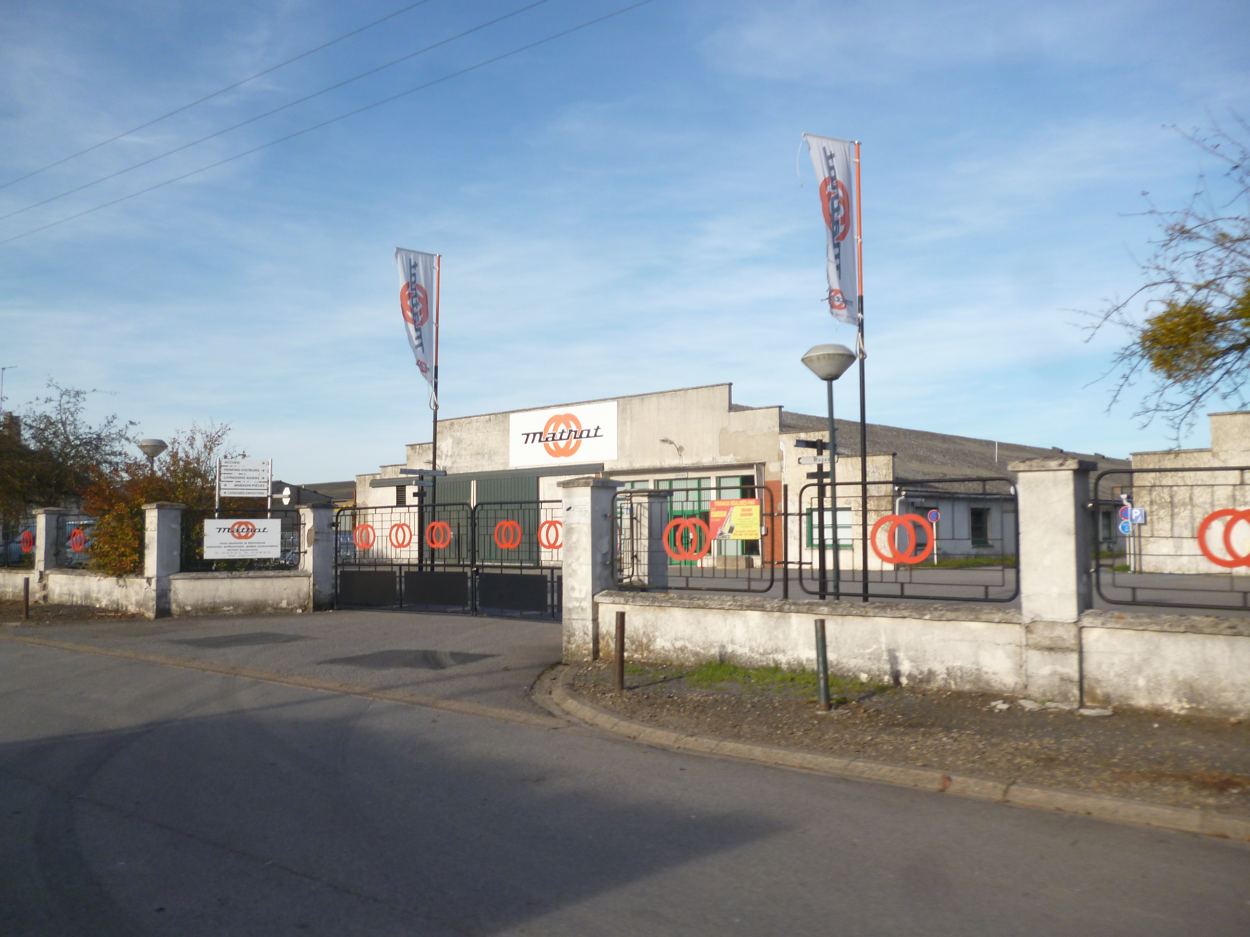 Usine Matrot située sur la commune de Noyers-Saint-Martin (Oise).